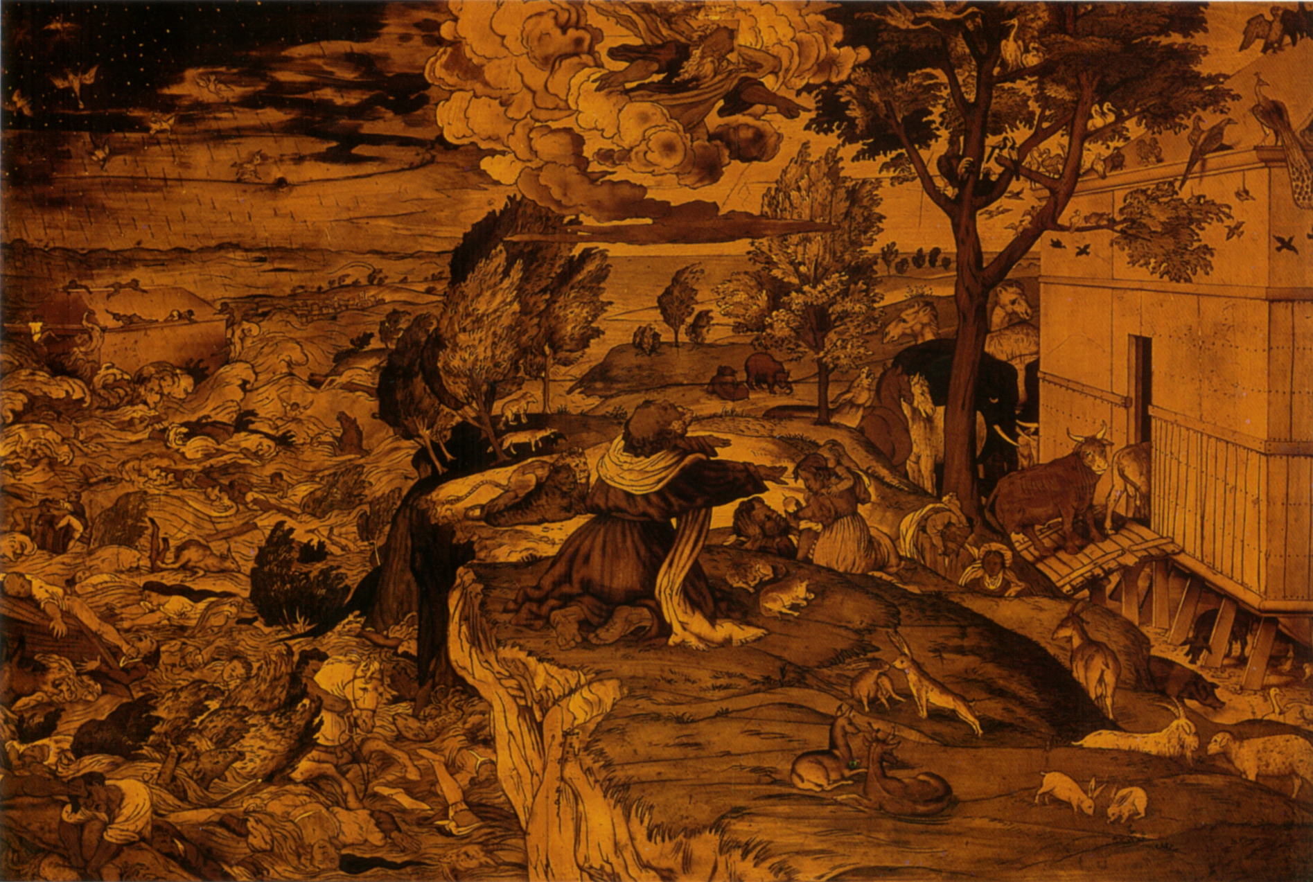 7.0 arca di noè